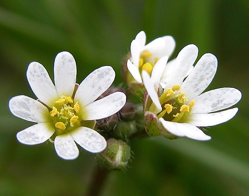 Hungerblümchen (erophila verna), aufgenommen am Hornberg in Buseck